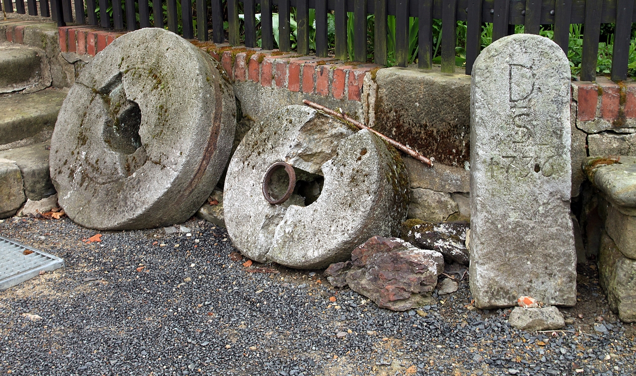 Waltersdorf (Großschönau): Mühlsteine und alter Grenzstein im Hof der Mittelmühle. Die Mühle entstand wahrscheinlich um 1400. Sie wurde 1614/15 als Steinbau neu errichtet und arbeitete später als Getreidemühle, Bäckerei, Schrotmühle und Sägewerk. Der Betrieb wurde 1955 eingestellt, ein Jahr später wurde hier das Heimatmuseum (heute Volkskunde- und Mühlenmuseum) eingerichtet. (Dorfstraße 89, Denkmal-Nr. 09270820)